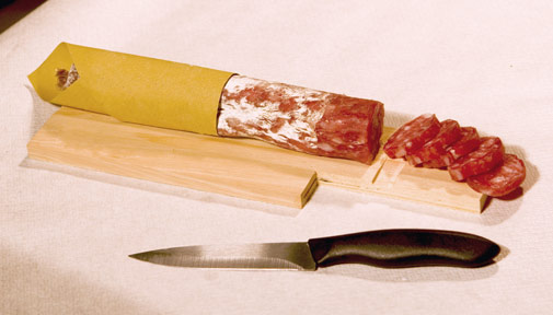 Il piccolo salame Strolghino di Culatello